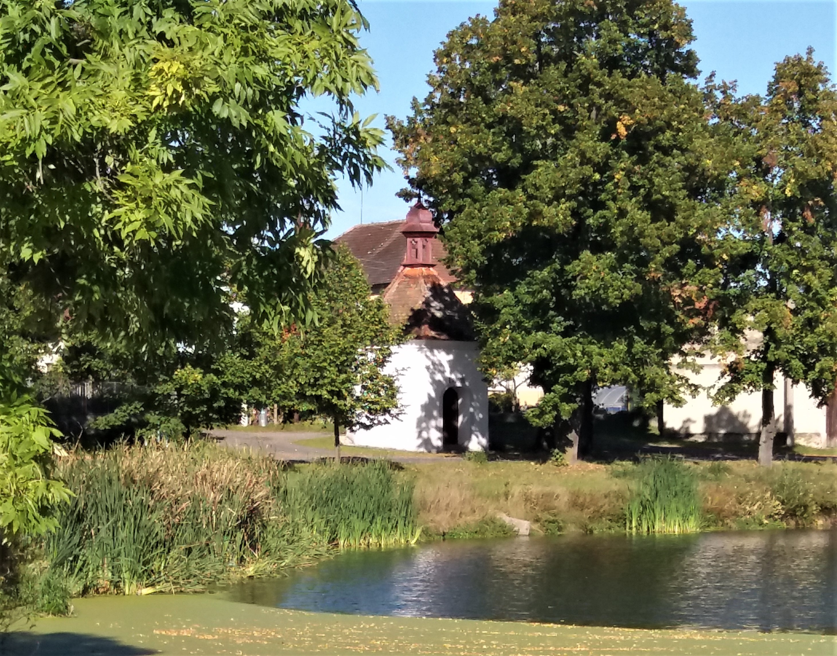 Kaple šestibokého půdorysu ve středu vsi